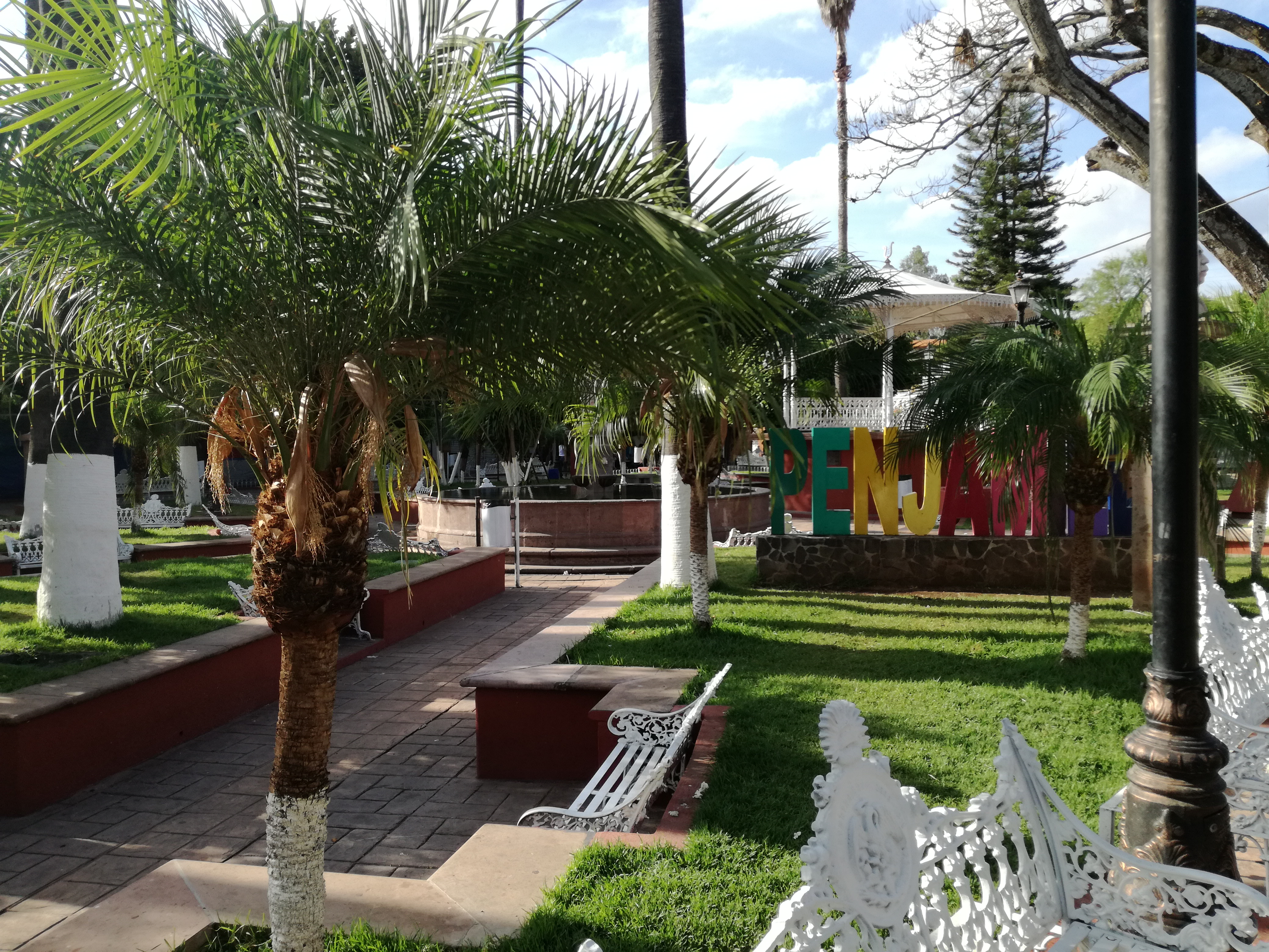 Plaza principal de Penjamillo, Michoacán